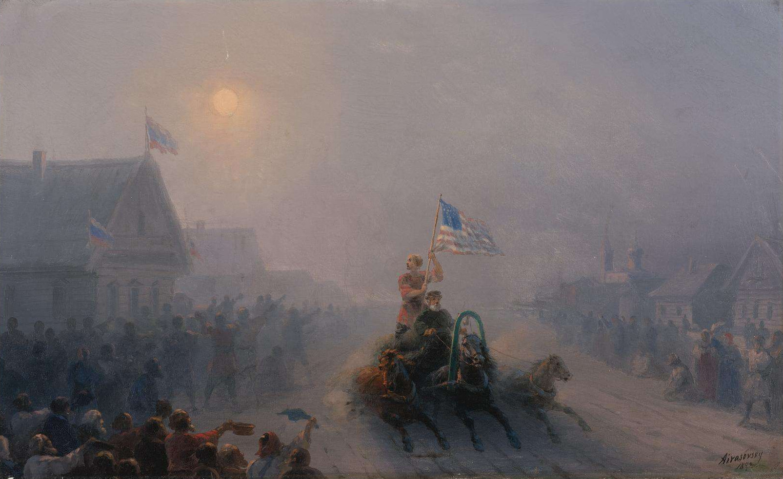 Aivazovsky - DISTRIBUTING SUPPLIES